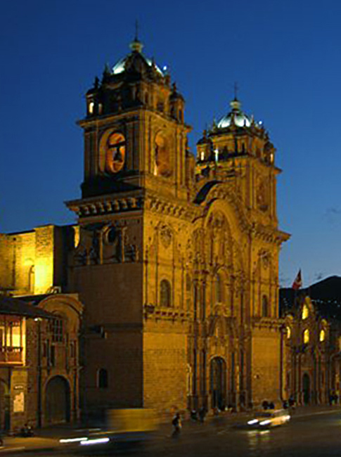 La Compañía kirken i Cusco